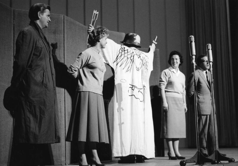 Gastspiel in Düsseldorf, 19.10.1956 Kabarett "Die Stachelschweine" Berlin